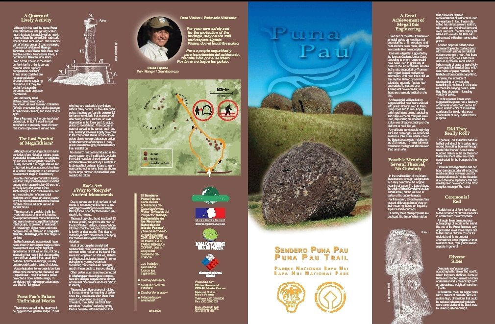 portada del folleto bilingue del sector Puna Pau, Parque Nacional rapa Nui